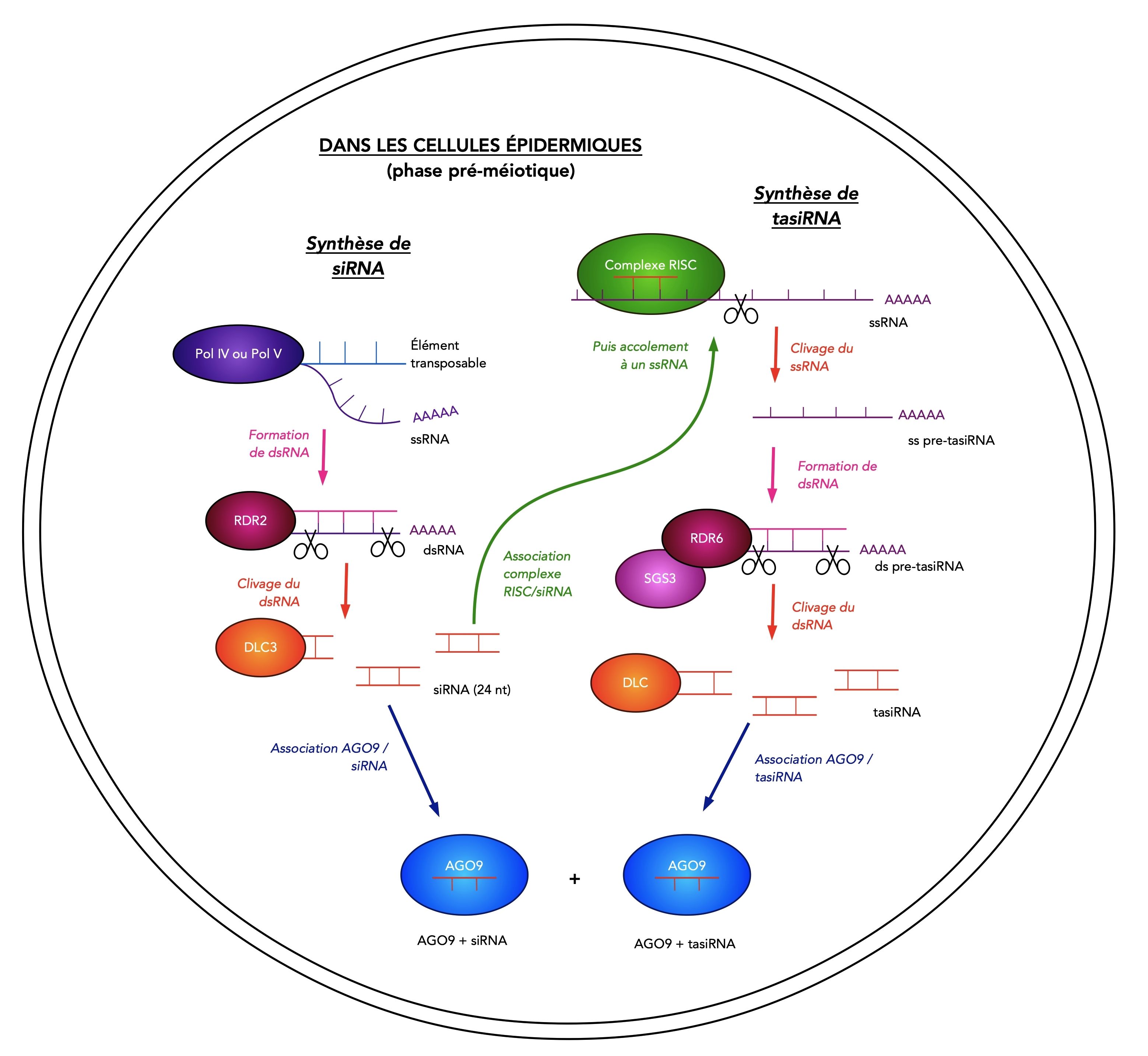 Biogenèse de siRNA et de tasiRNA impliqués dans la régulation de la mégasporogenèse chez Arabidopsis thaliana au niveau des cellules épidermiques pendant la phase pré-méiotique